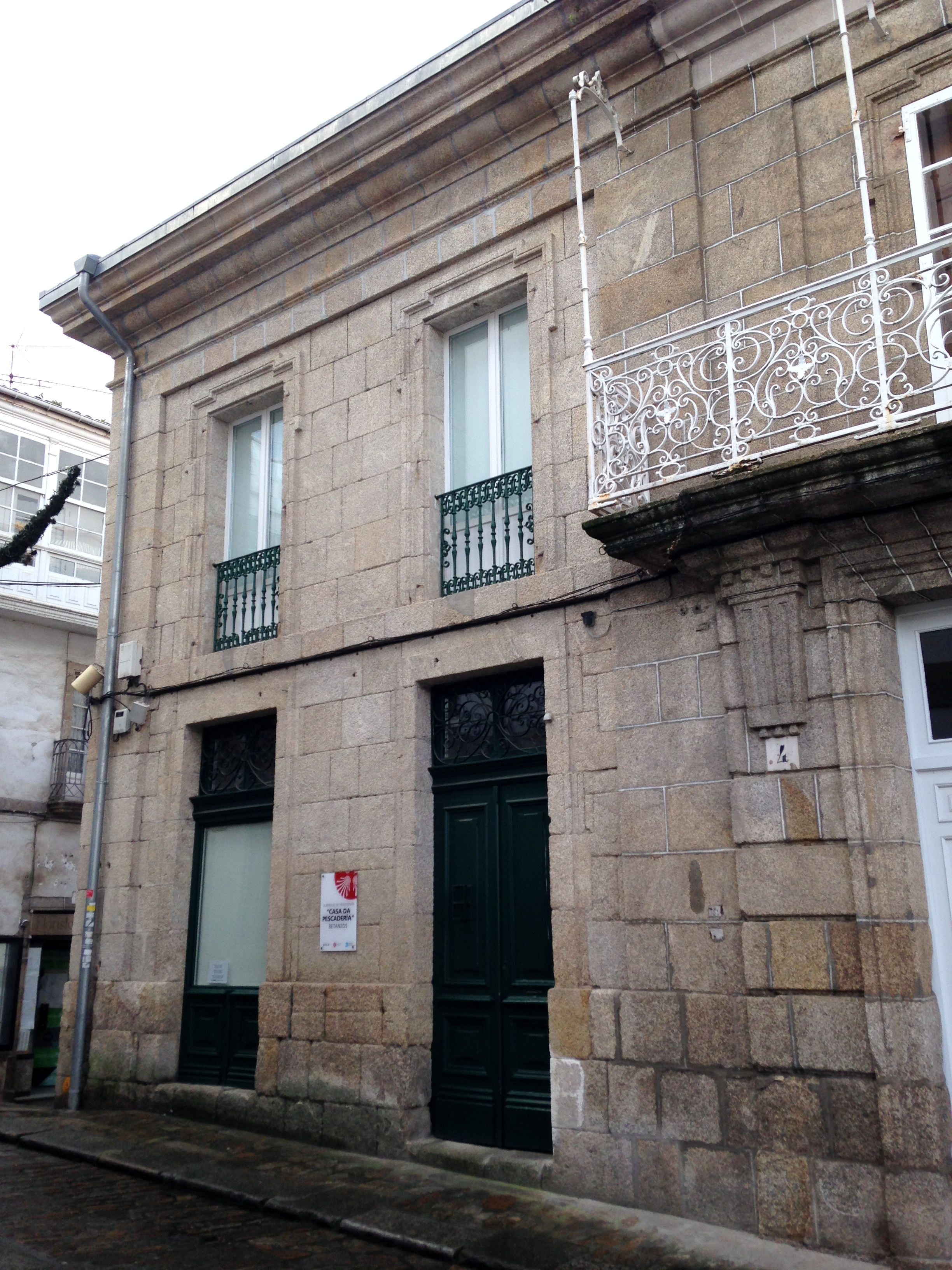 Antiga Casa da Pescadería, actualmente albergue de peregrinos de Betanzos.